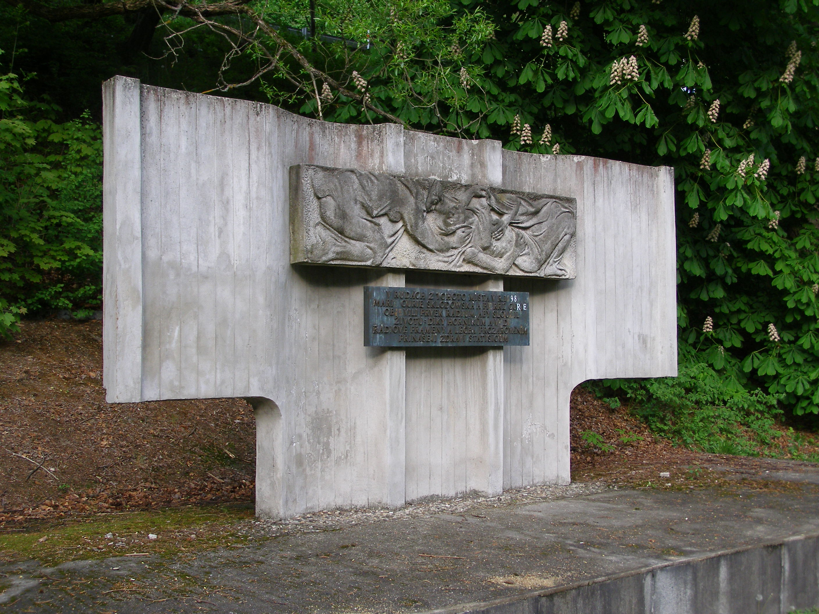 Plastika Milosrdenství umístěná v lázeňském parku v Jáchymově